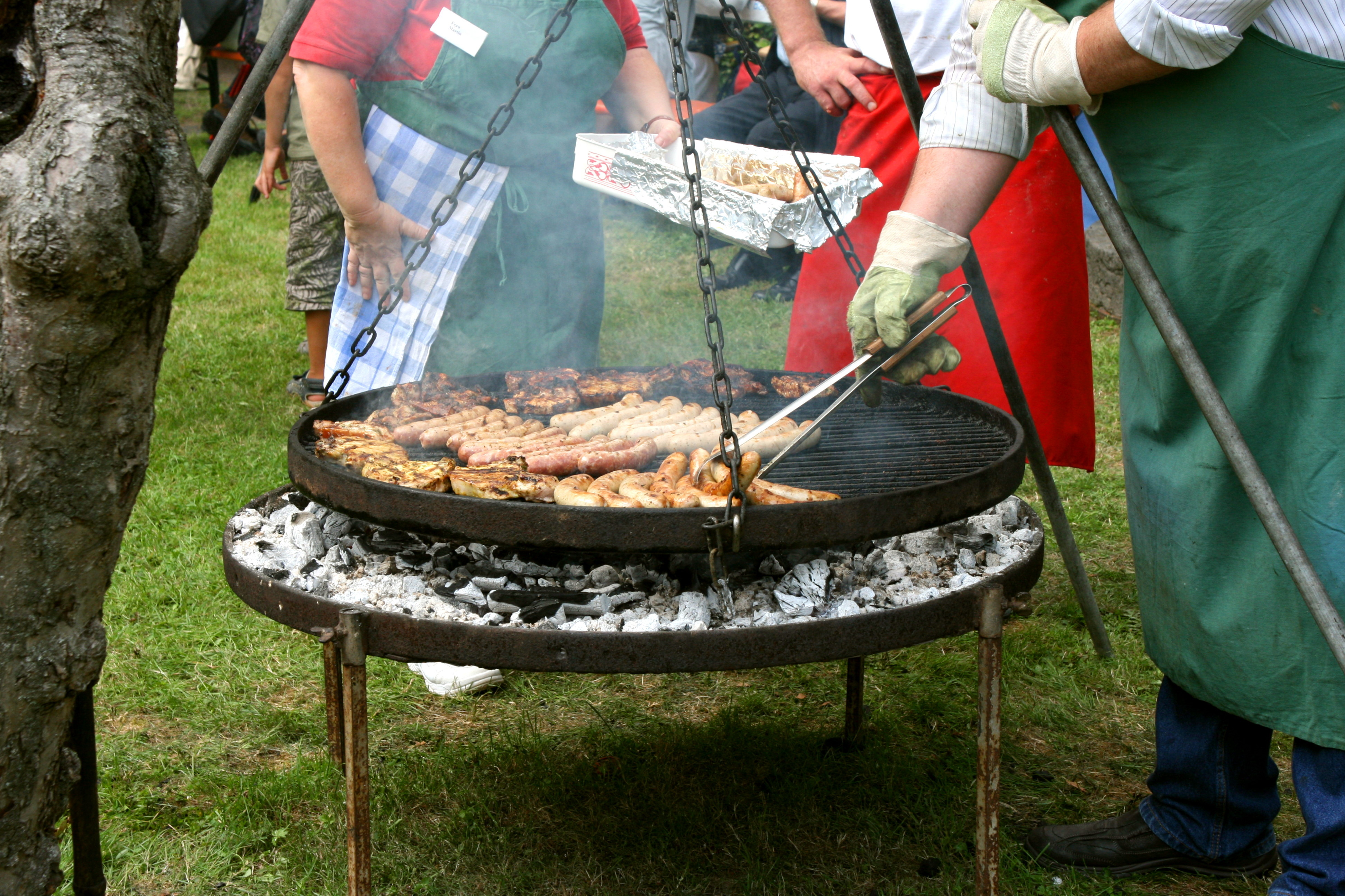 Museumsfest 2010 im Bergischen Museum für Bergbau, Handwerk und Gewerbe, Burggraben 9-21 in Bergisch Gladbach